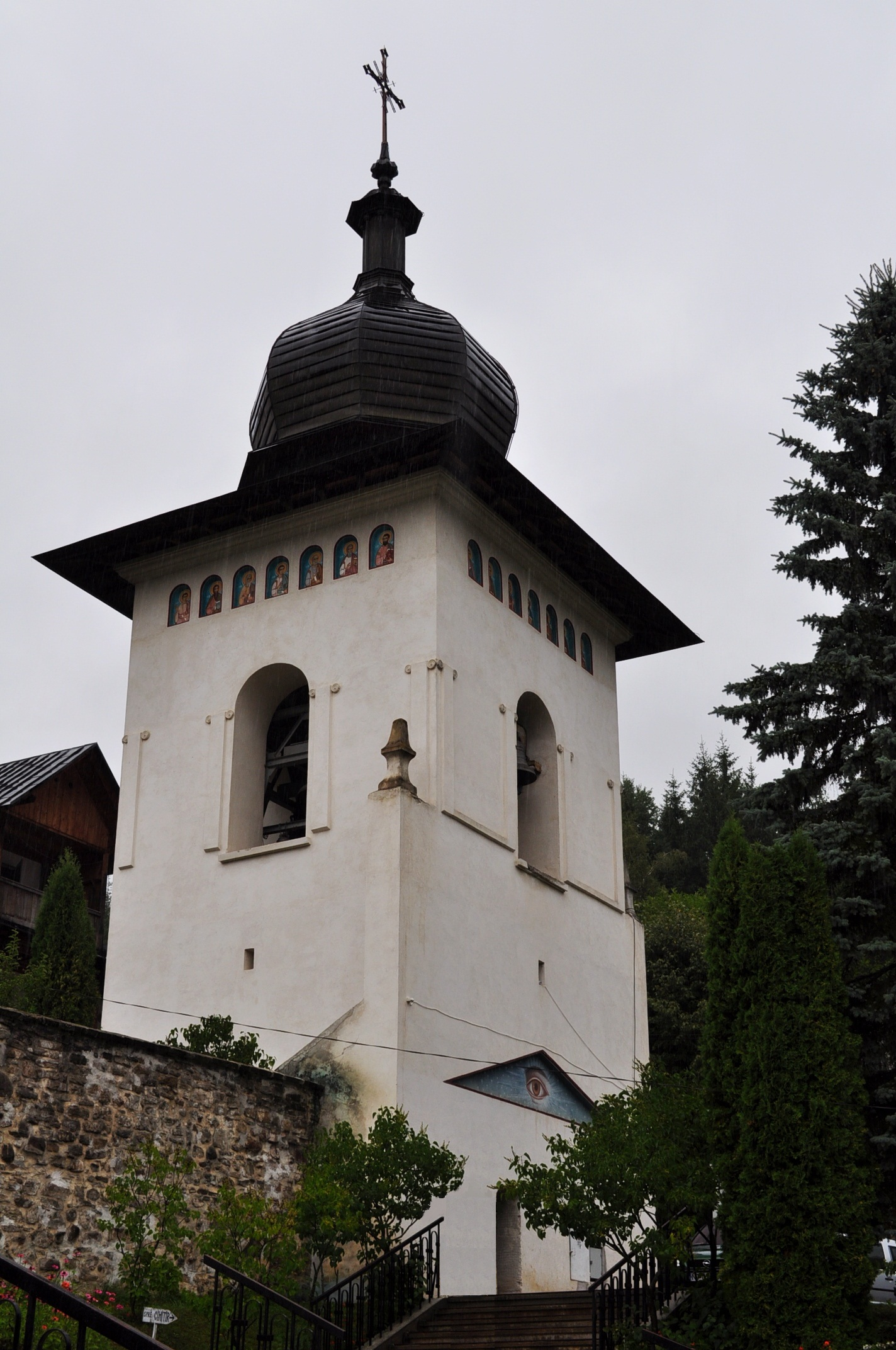 Mănăstirea Sihăstria Secului 06